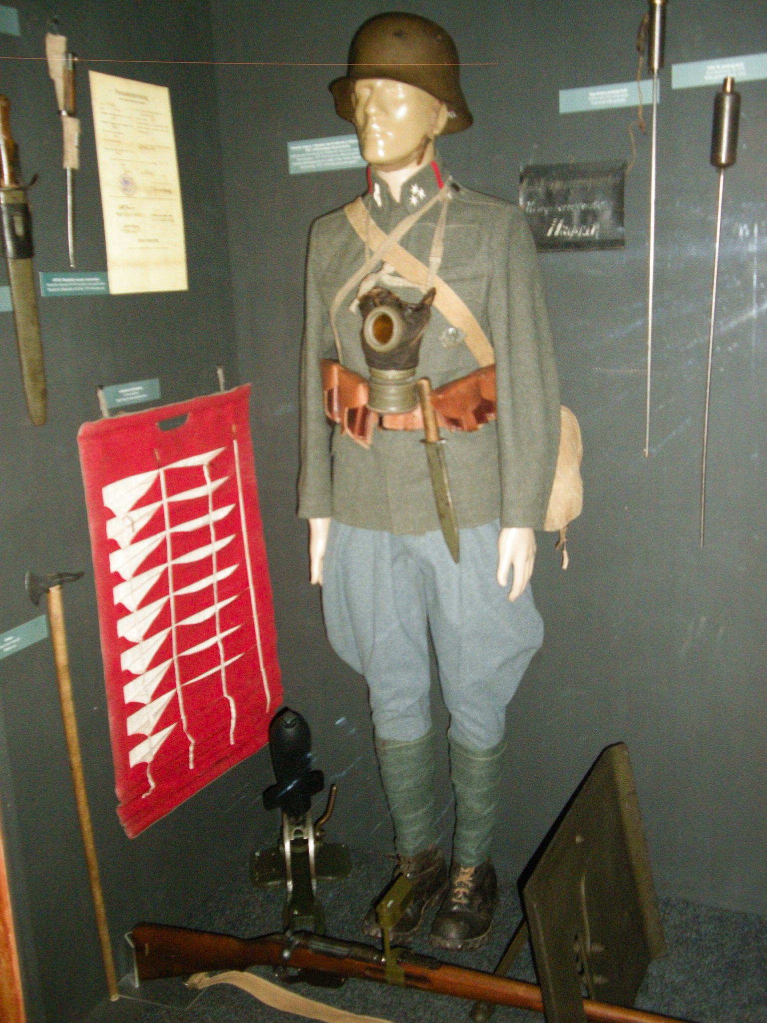 Budapest 2012